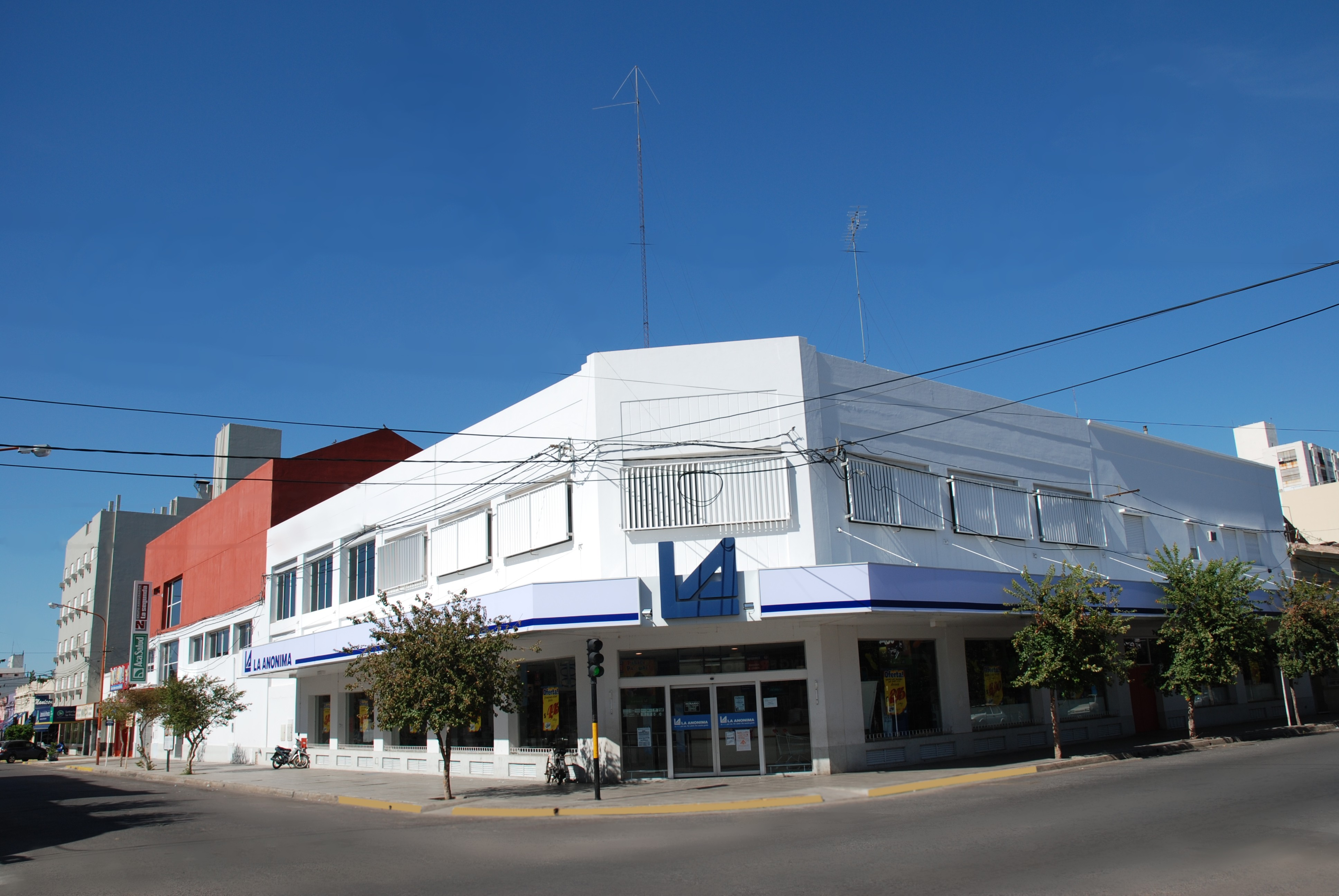 Supermercado La Anónima, en la antigua esquina de la Liga Agrícola Ganadera (Rivadavia y Pellegrini) en Junín, Argentina.